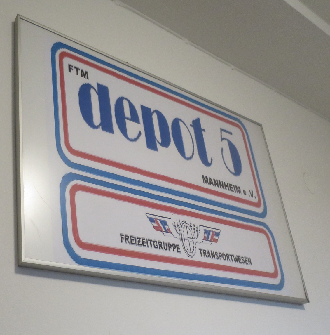 Logo des Verkehrsmuseums "Depot 5" in Mannheim